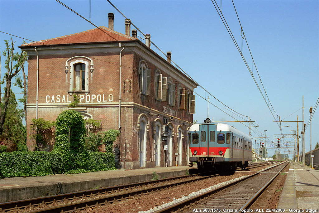 Stazione ferroviaria di Casale Popolo, in sosta l'automotrice ALn 668.1575.